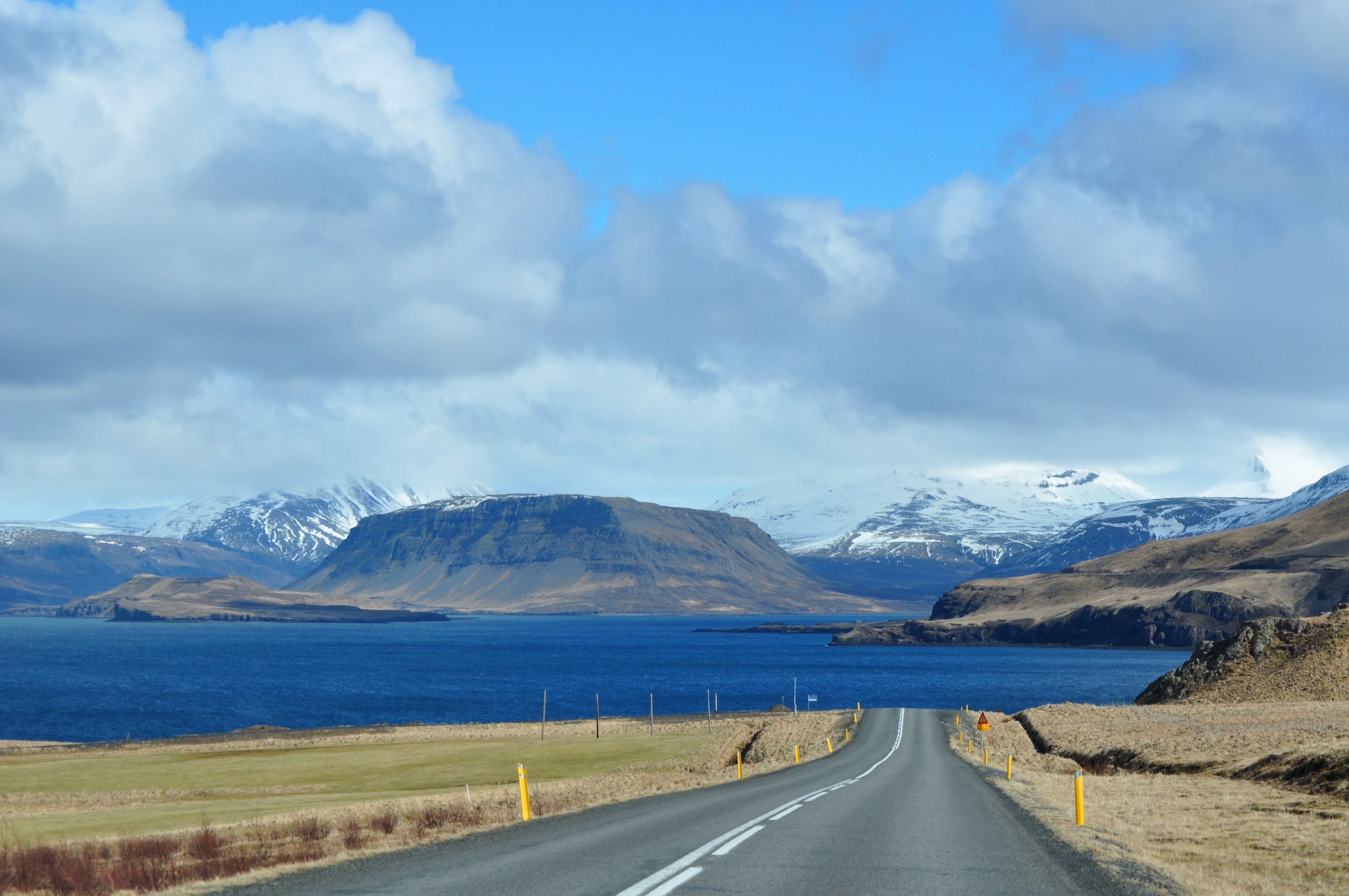 Hvalfjörður på Island